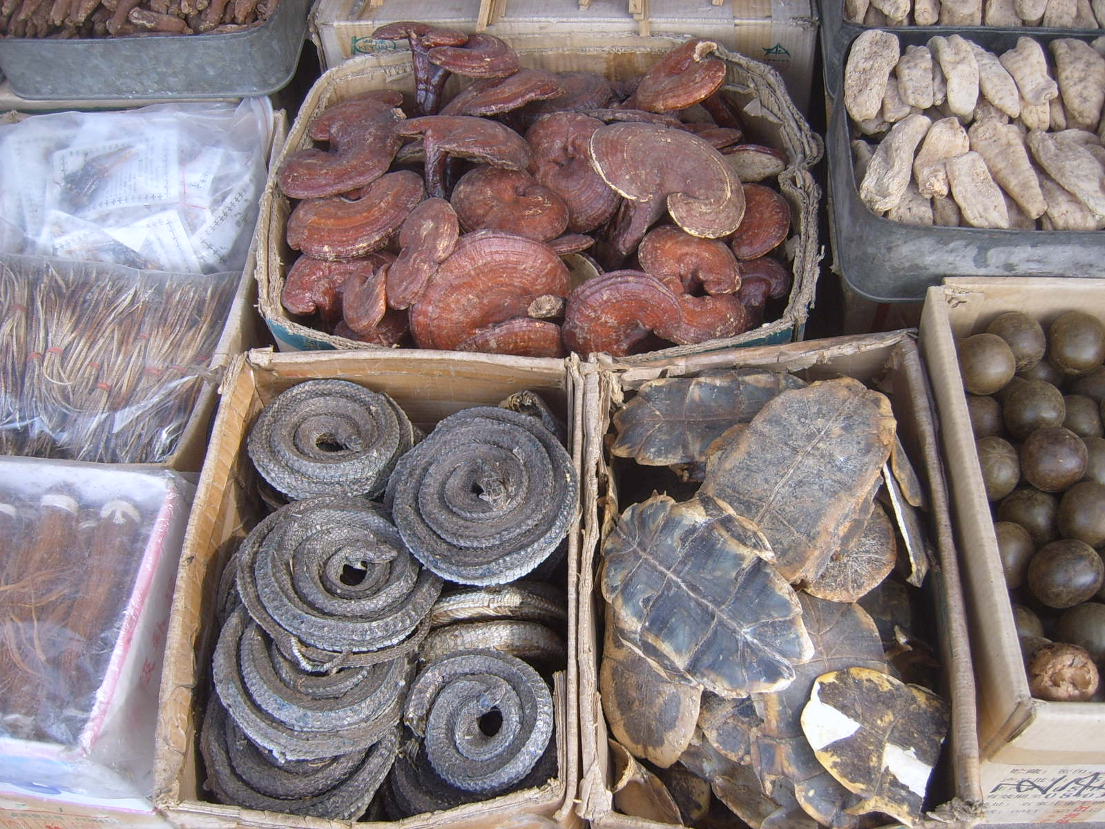 Some elements for Médecine chinoise in Xi'an